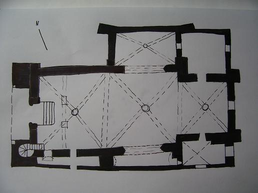 Grundriss Saint-Julien 19-20. JH